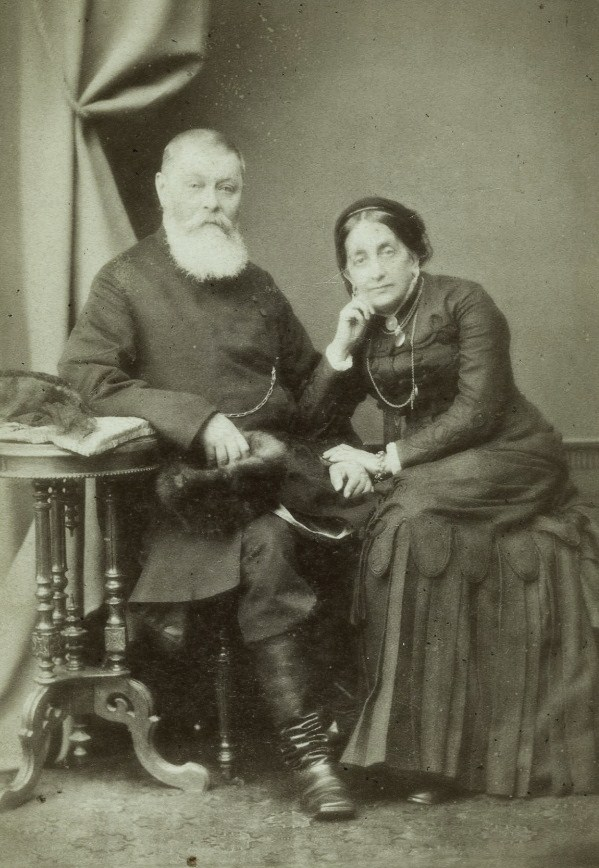 Александр Николаевич Карамзин (1815—1888) с женой Наталье Васильевной, ур. Оболенской (1827—1892)